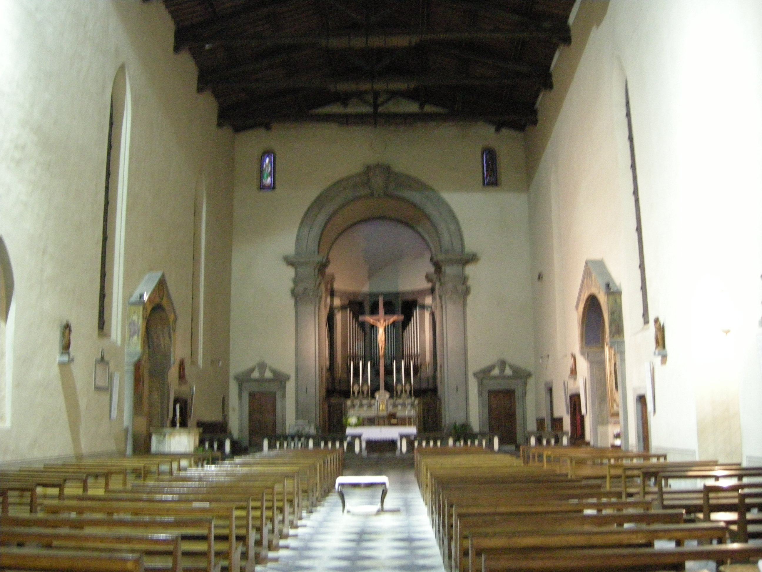 Figline, collegiata di santa maria, interno